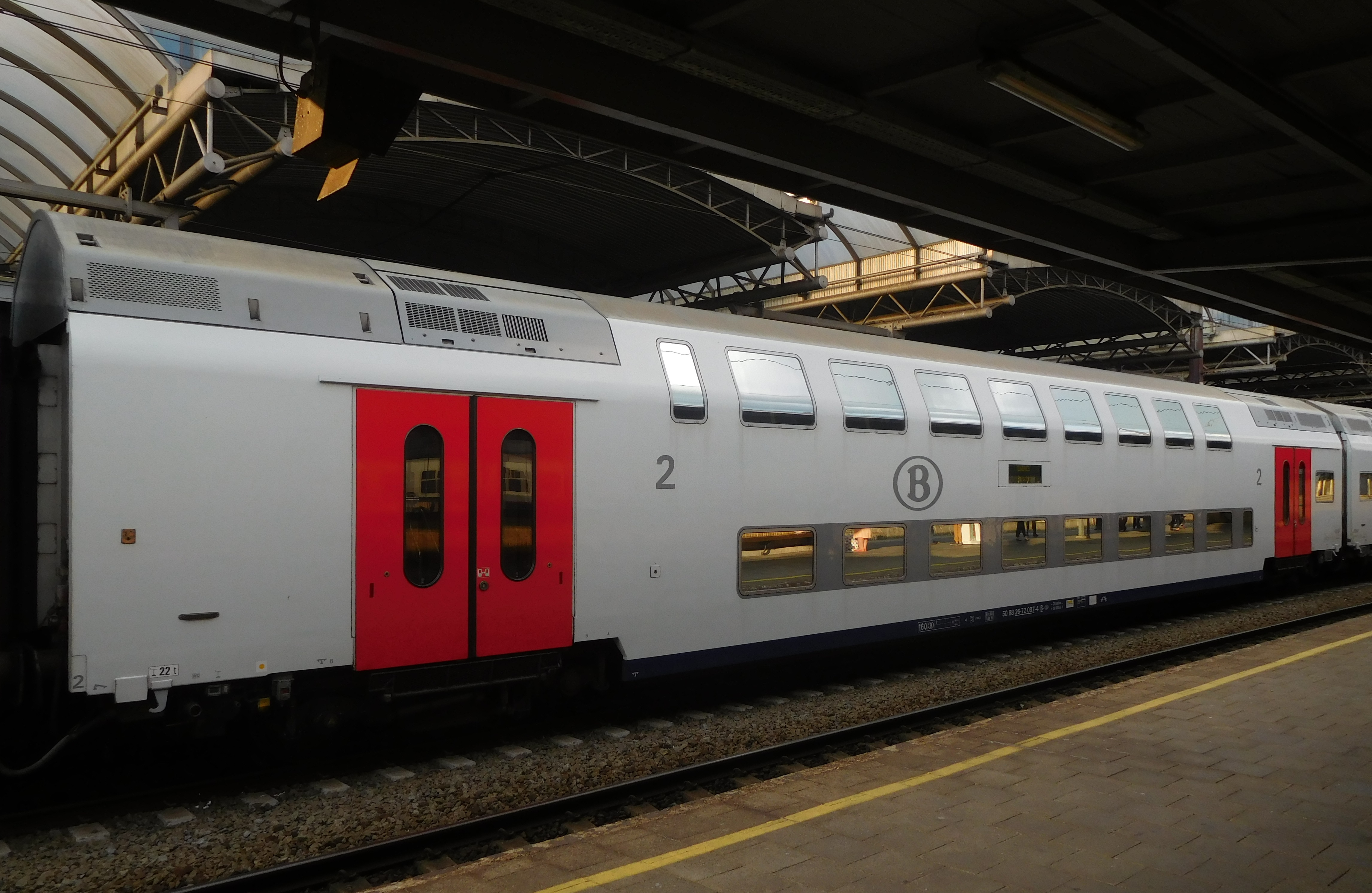 M6B sur un IC vers Tongres